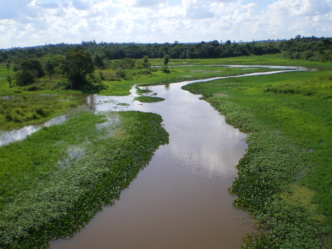 Fotos de los refugios y reservas de Itaipu, tomadas en los años 2007 y 2008 por mí